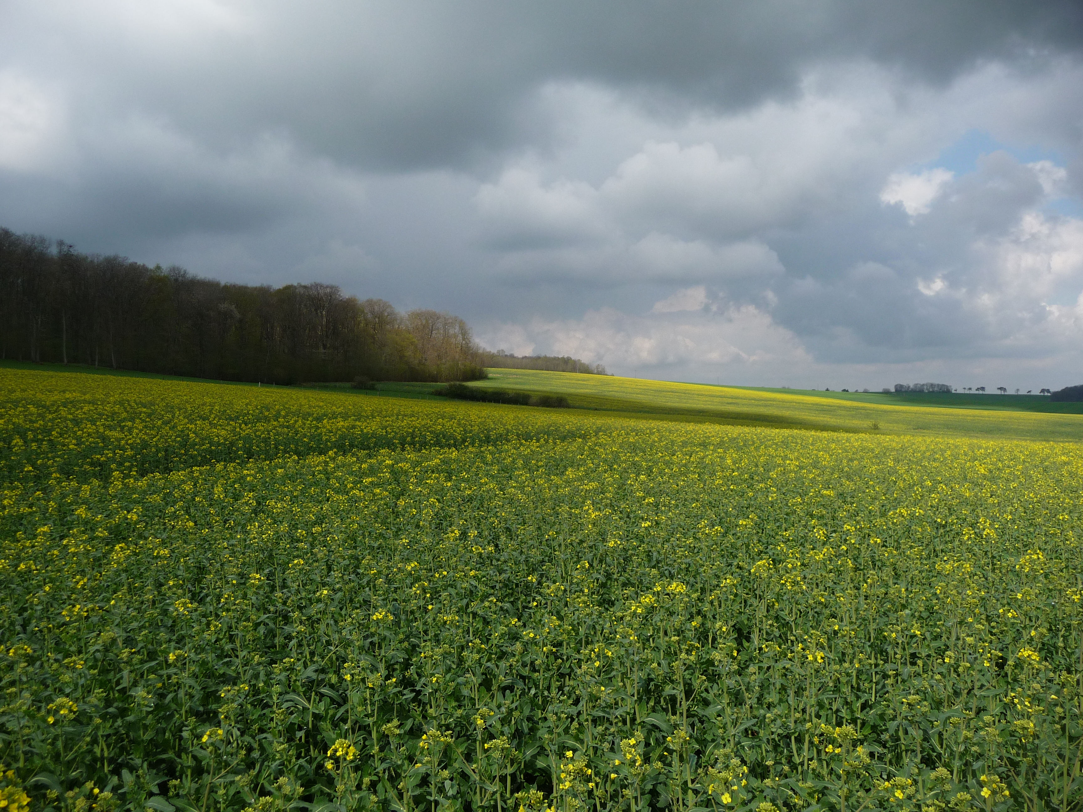 Champ près de Lagery